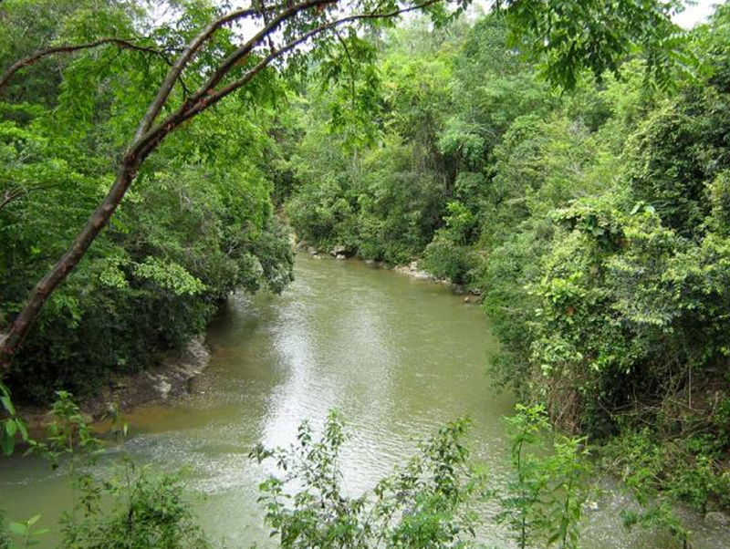 machaquila